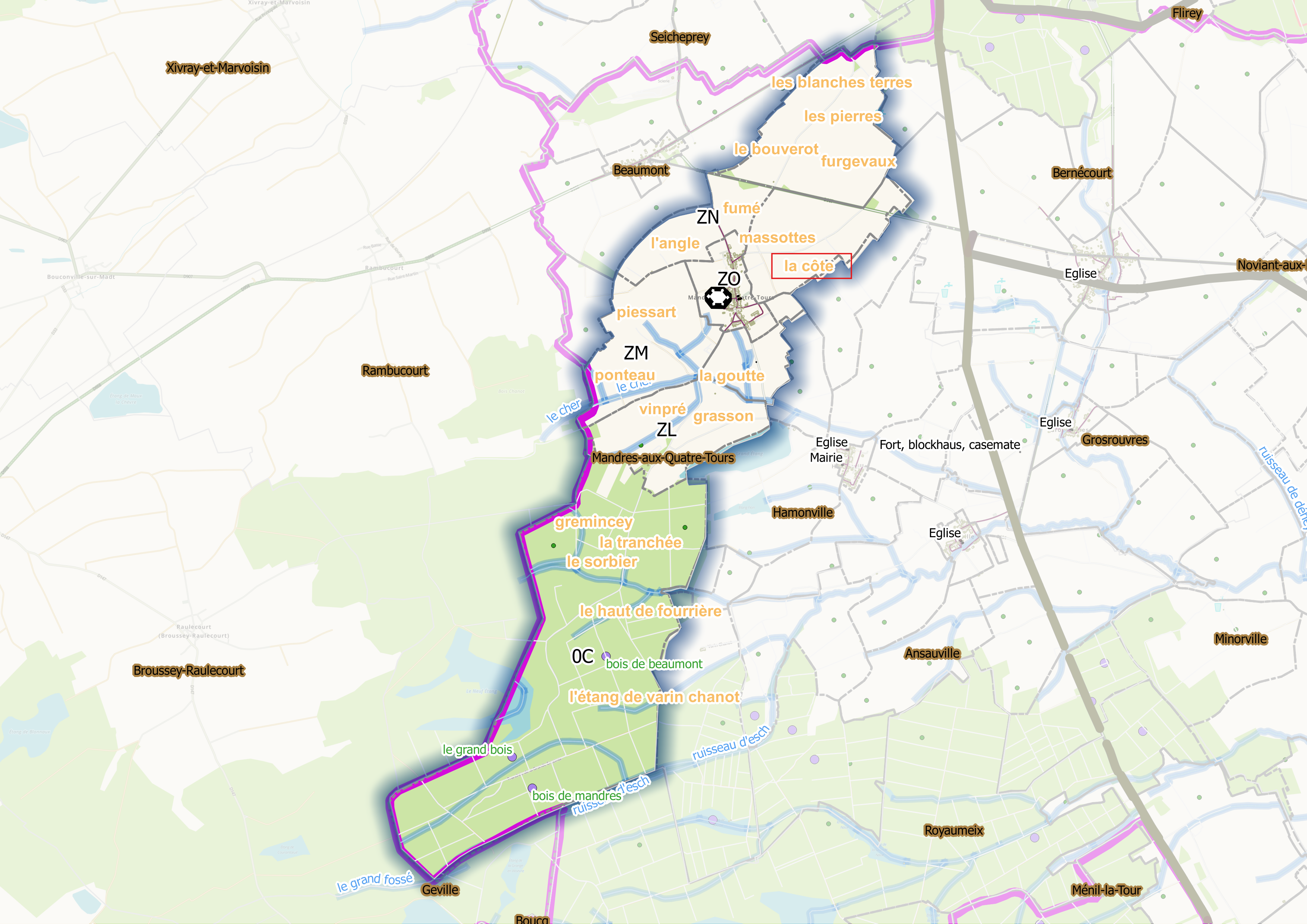 Mandres (ban communal) Qgis et OSM , mentions manuscrites